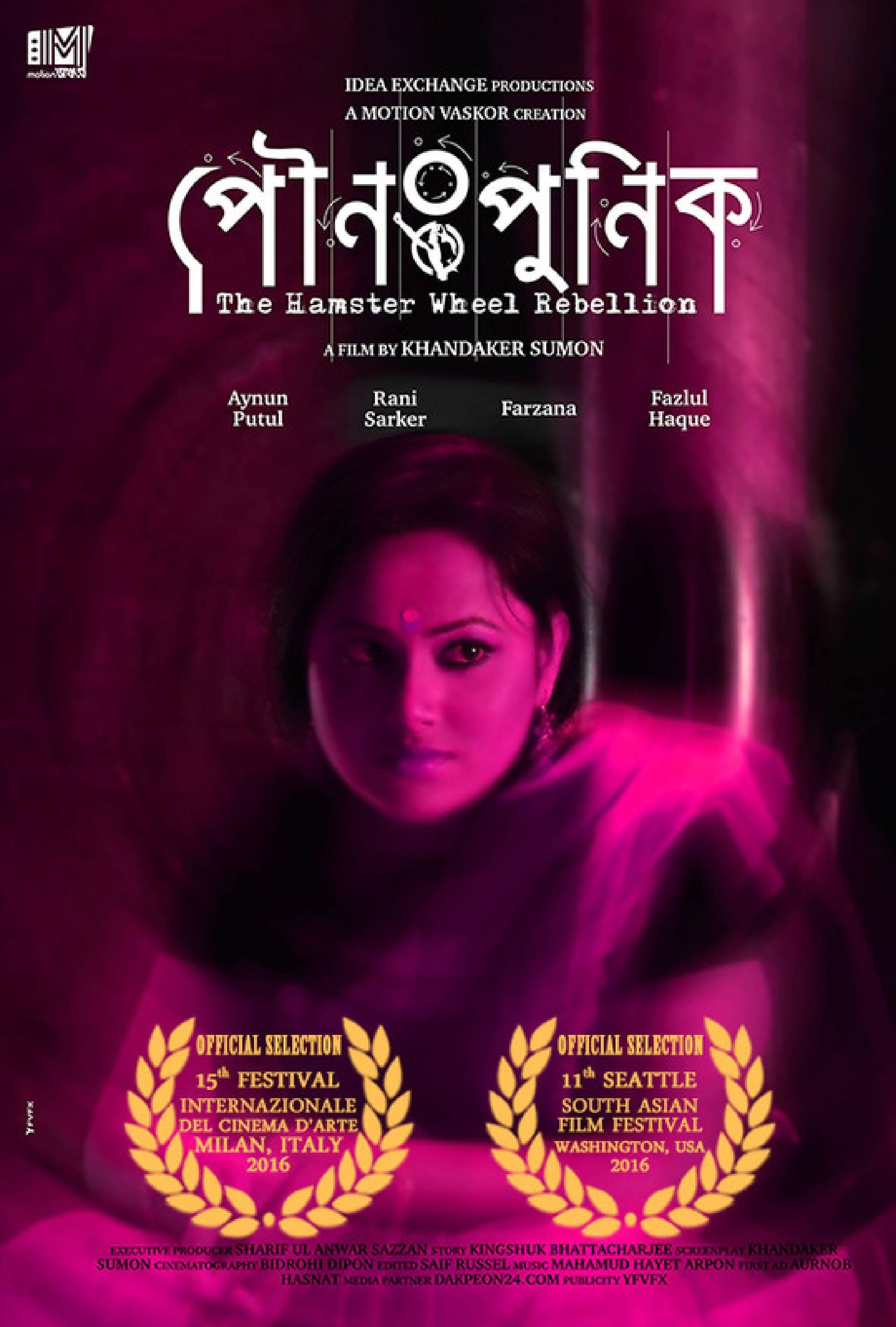 স্বল্পদৈর্ঘ্য চলচ্চিত্র 'পৌনঃপুনিক' এর পোস্টার। সমাজের অবদমিত অধ্যায়ের অস্পৃশ্য নারীর দ্রোহ ও শেকল ভাঙ্গার অদম্য সাহস, স্বপ্ন, লড়াই এবং হেরে গিয়ে যাপিত জীবনের পুনরাবৃত্তির ঘটনা প্রবাহ নিয়ে নির্মিত স্বল্পদৈর্ঘ্য চলচ্চিত্র ‘পৌনঃপুনিক’